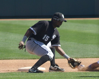 Wilson Betemit